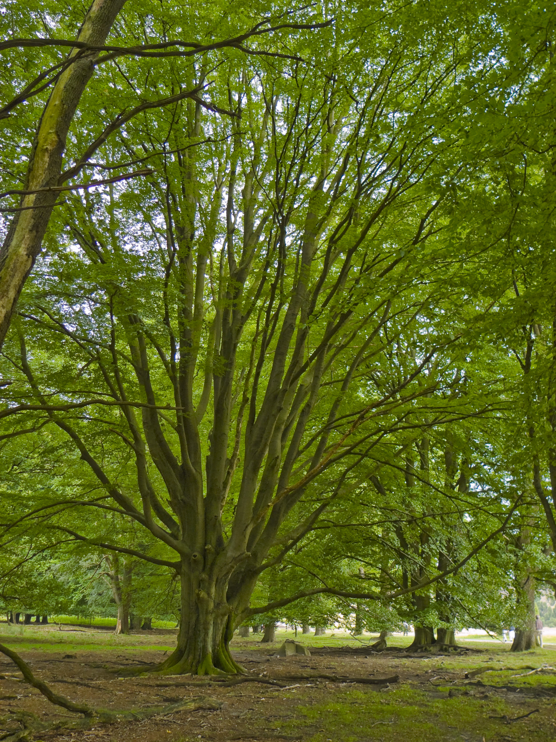 Alte Hutebuche (Fagus sylvatica) bei Wilsede, Lüneburger Heide